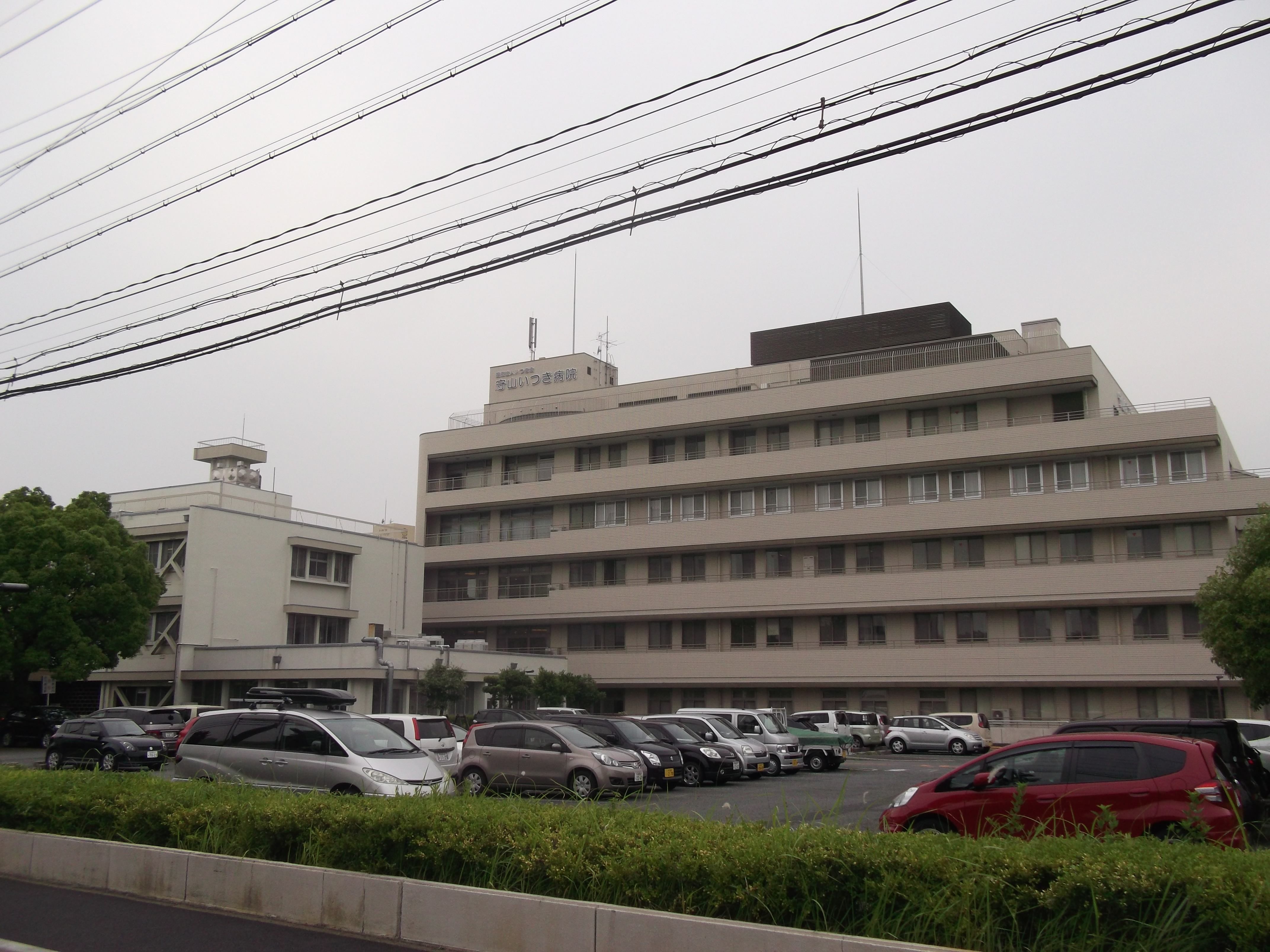 愛知県名古屋市守山区守山二丁目の守山いつき病院（旧名古屋市立東部医療センター守山市民病院）を南側公道東側より撮影